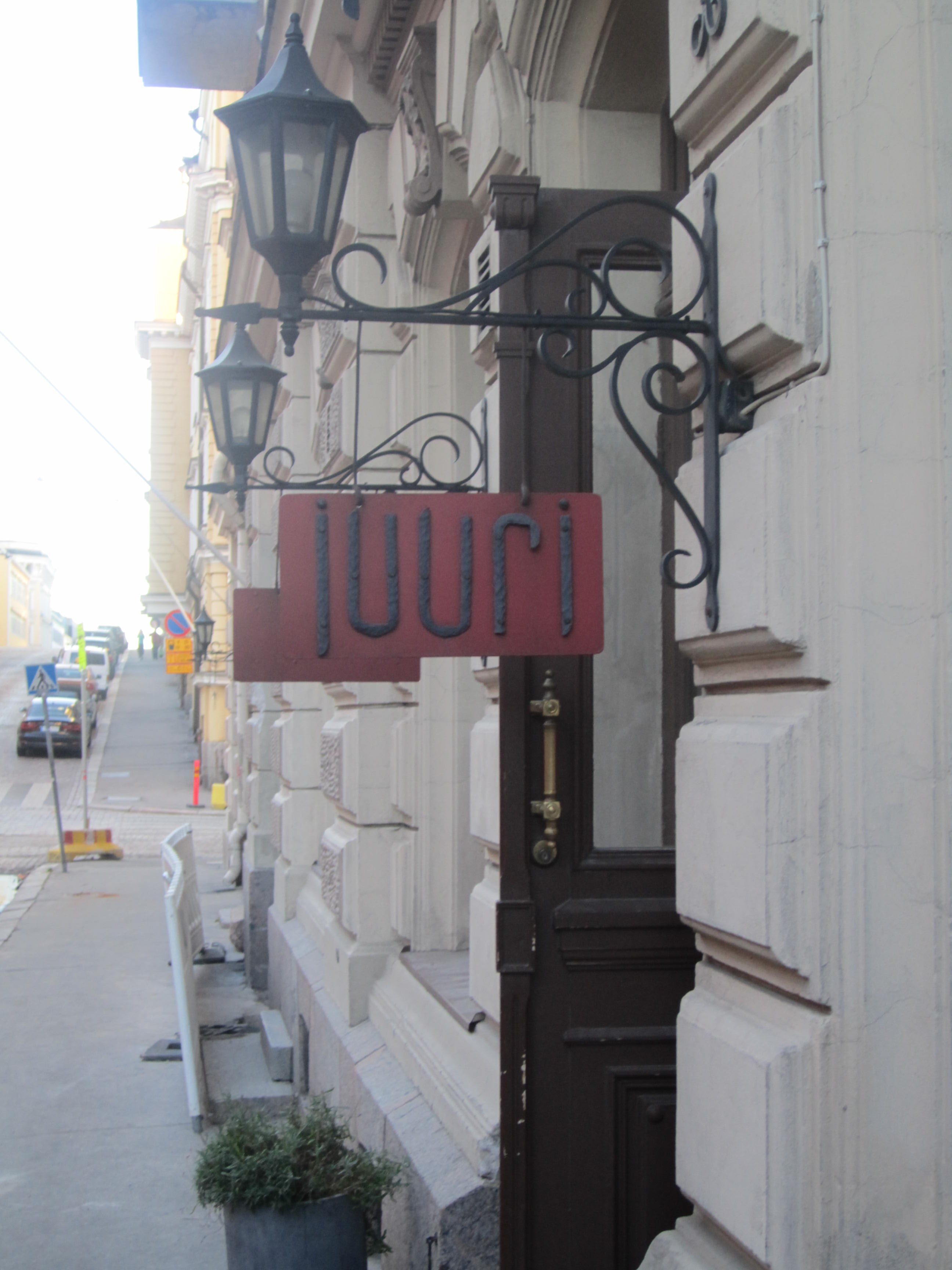 Ravintola Juuri Helsingin Kaartinkaupungissa.